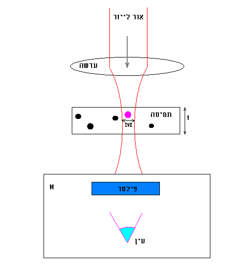 שרטוט של מלקחיים אופטיים